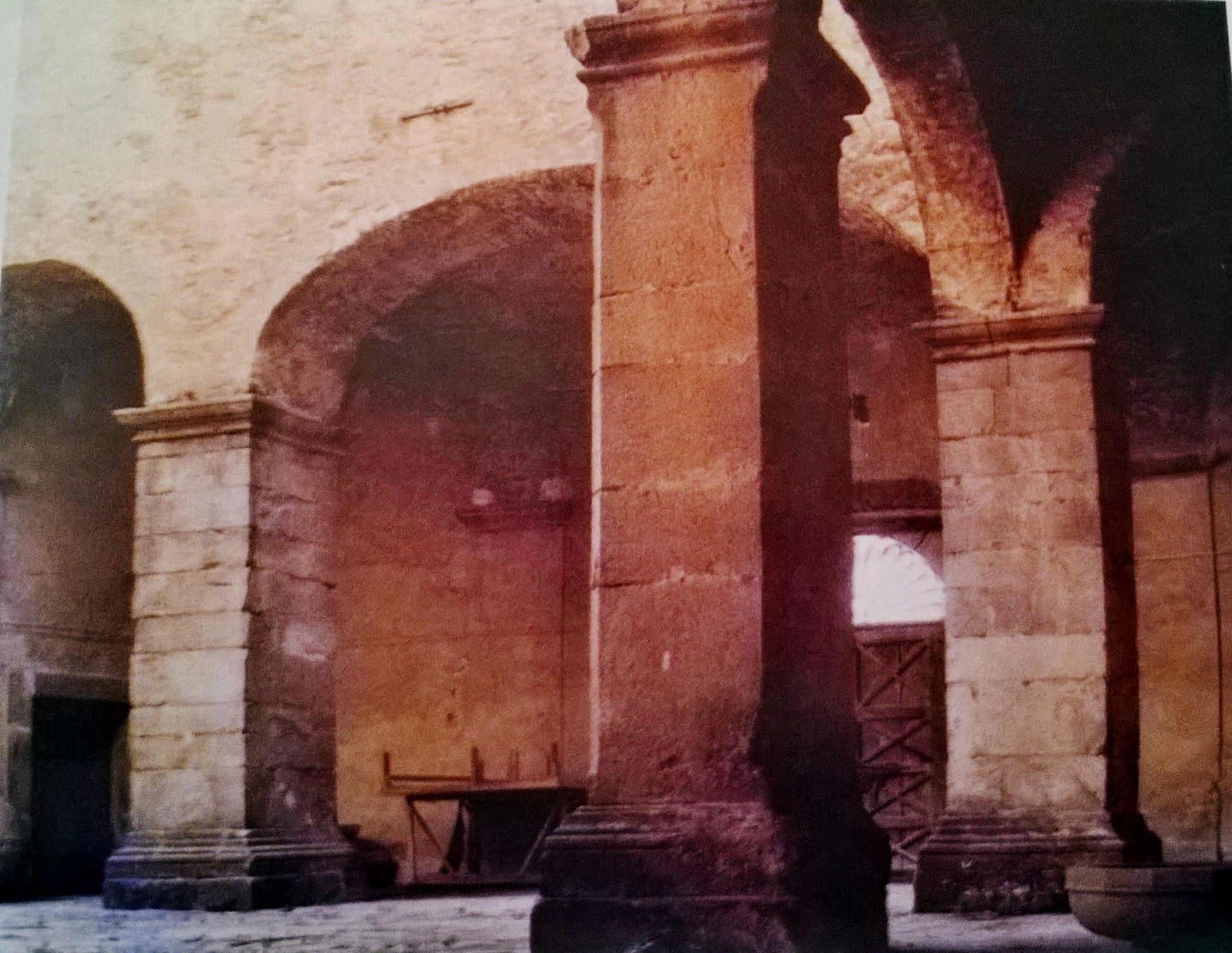 La Rocca longobarda del sec. IX era a due lati con due Torri ; poi fu fatto un terzo braccio dai del Mercato proprietari fino al '600 ; nel '700 viene chiuso il quadrilatero per opera del famoso architetto Ferdinando Sanfelice che trasse i pilastri dal Convento di rito greco-ortodosso di S. Mango ; restò il Ponte levatoio interno. Tornato nel primo '800 ai del Mercato , Enrico murò il Ponte e aprì lo scalone.